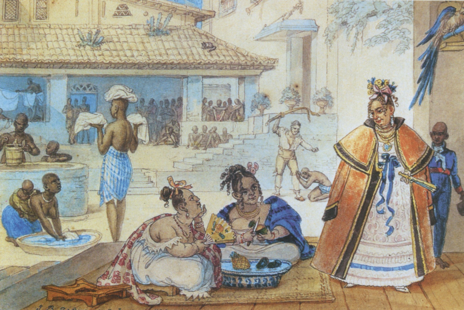 Jean-Baptiste Debret: Interior de uma casa cigana (Debret: gipsy's house)